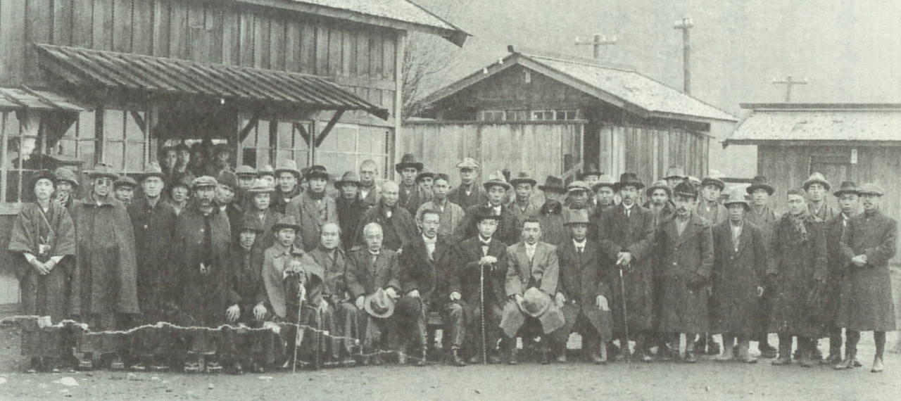 Kabocha Chinjōdan